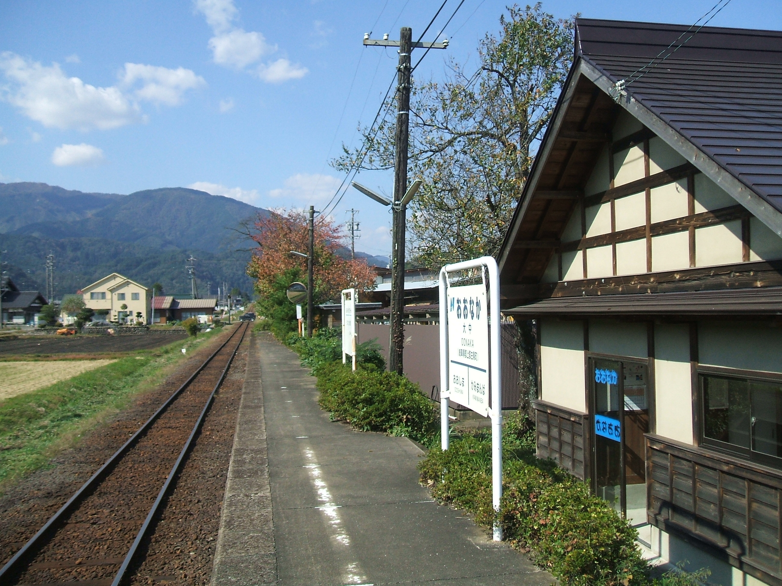 ホームの様子